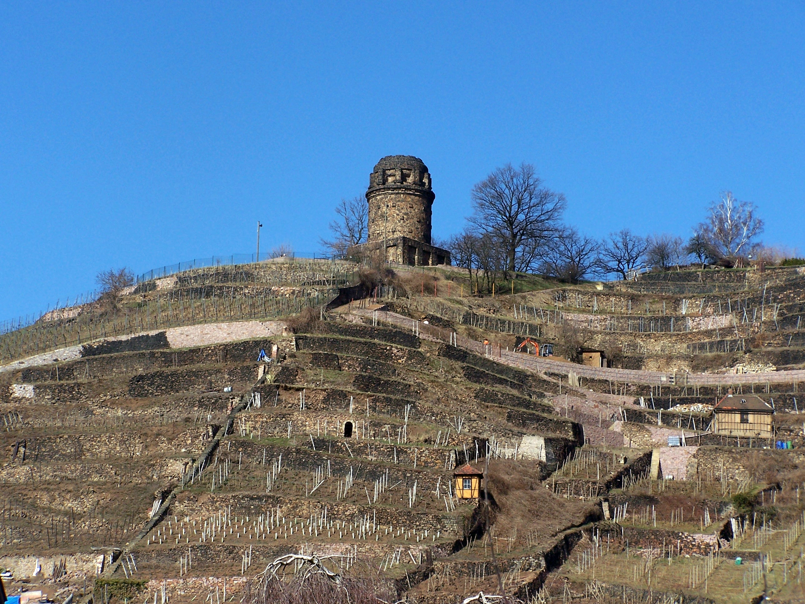 Bismarckturm Radebeul